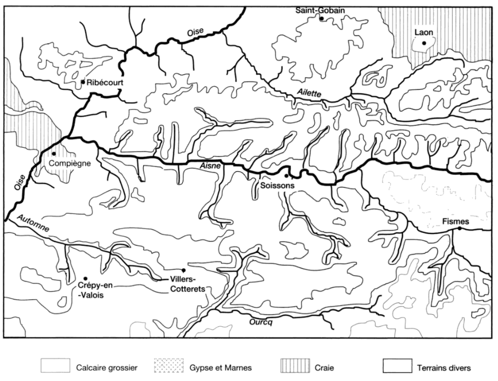 Frontières naturelles du Soissonnais